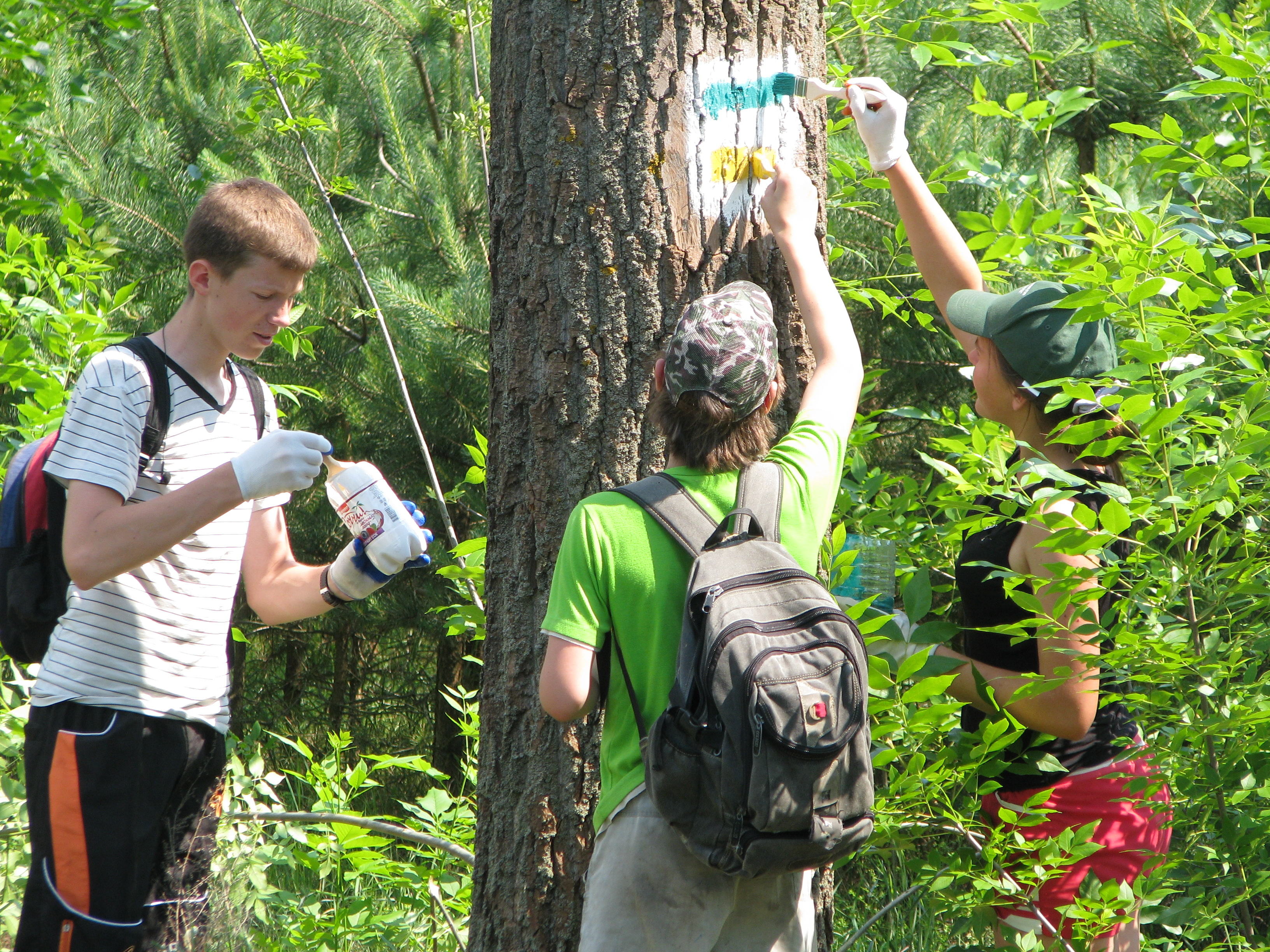 Маркіроўка зялёнага маршруту